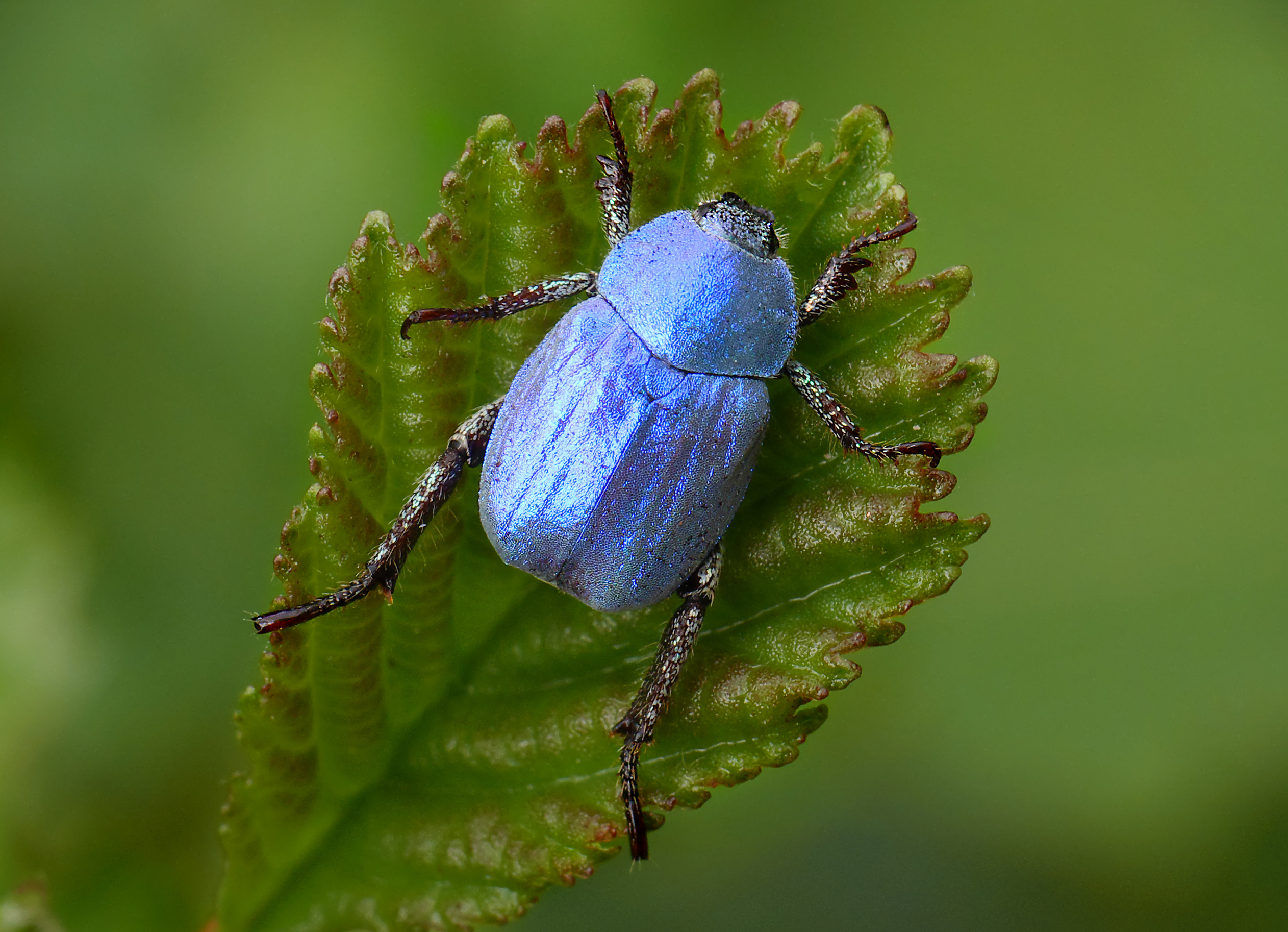 Hoplia coerulea à Meyrueis, Cévennes, France.